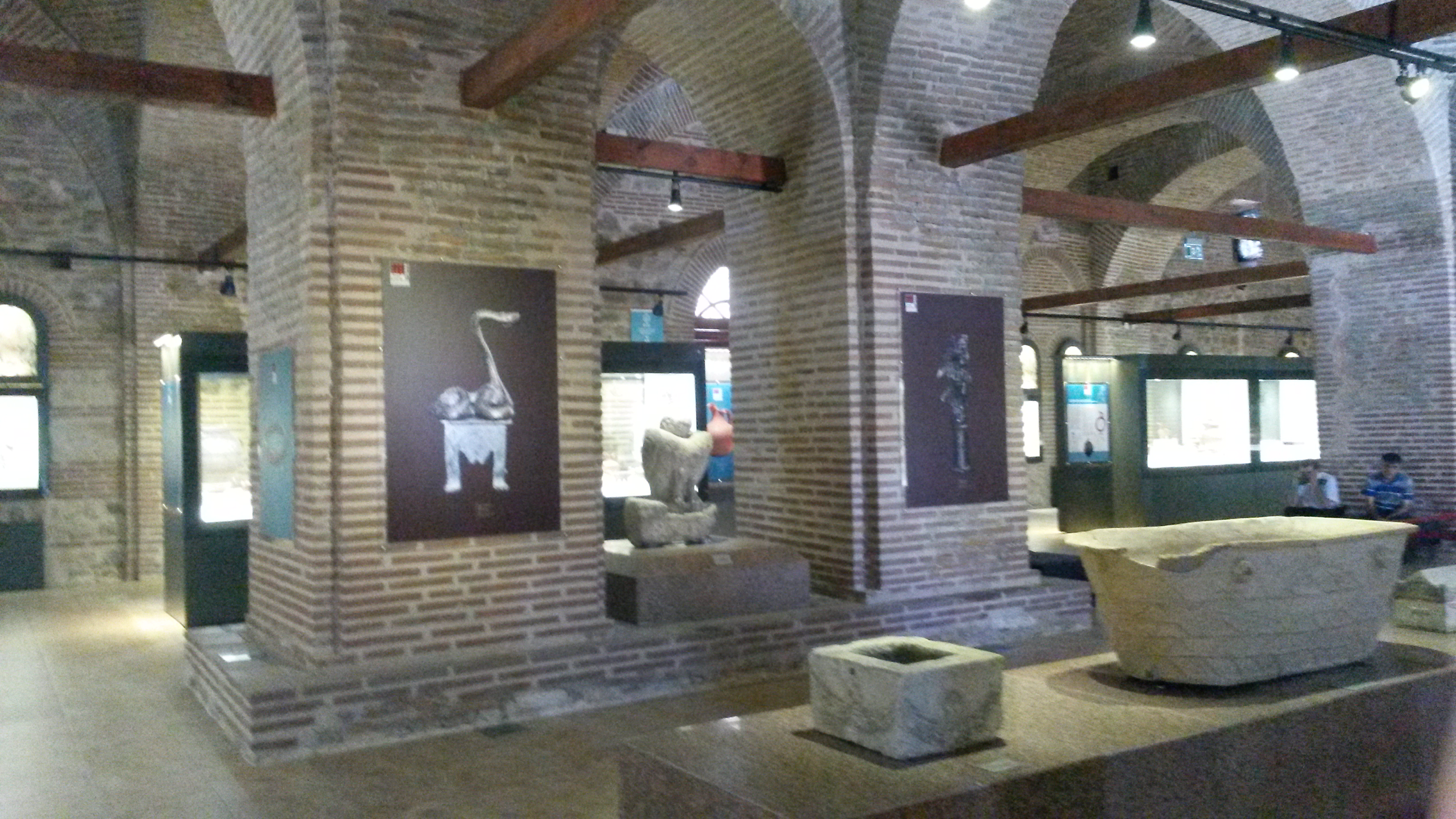 Tokat müzesi tarihi arastalı bedesten içerisinde bulunmaktadır.